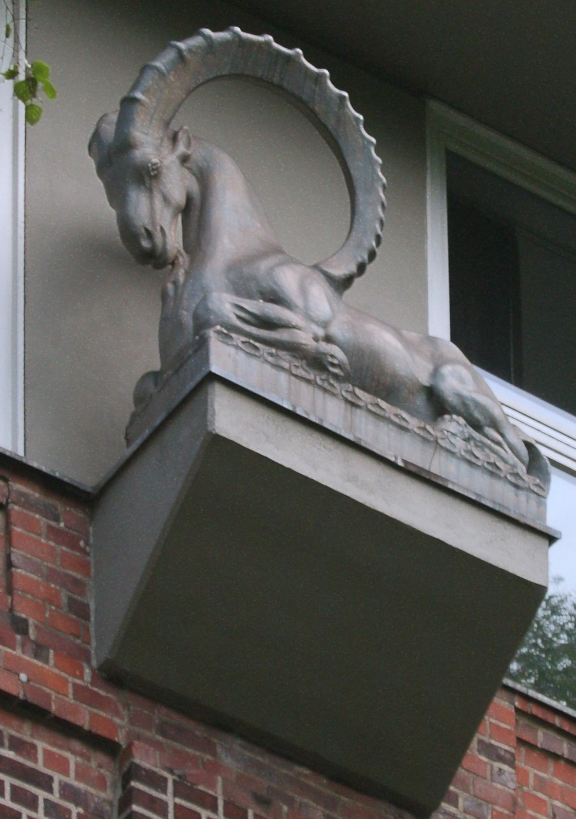 Widderskulptur von Richard Luksch an der Hochschule für bildende Künste auf Uhlenhorst.